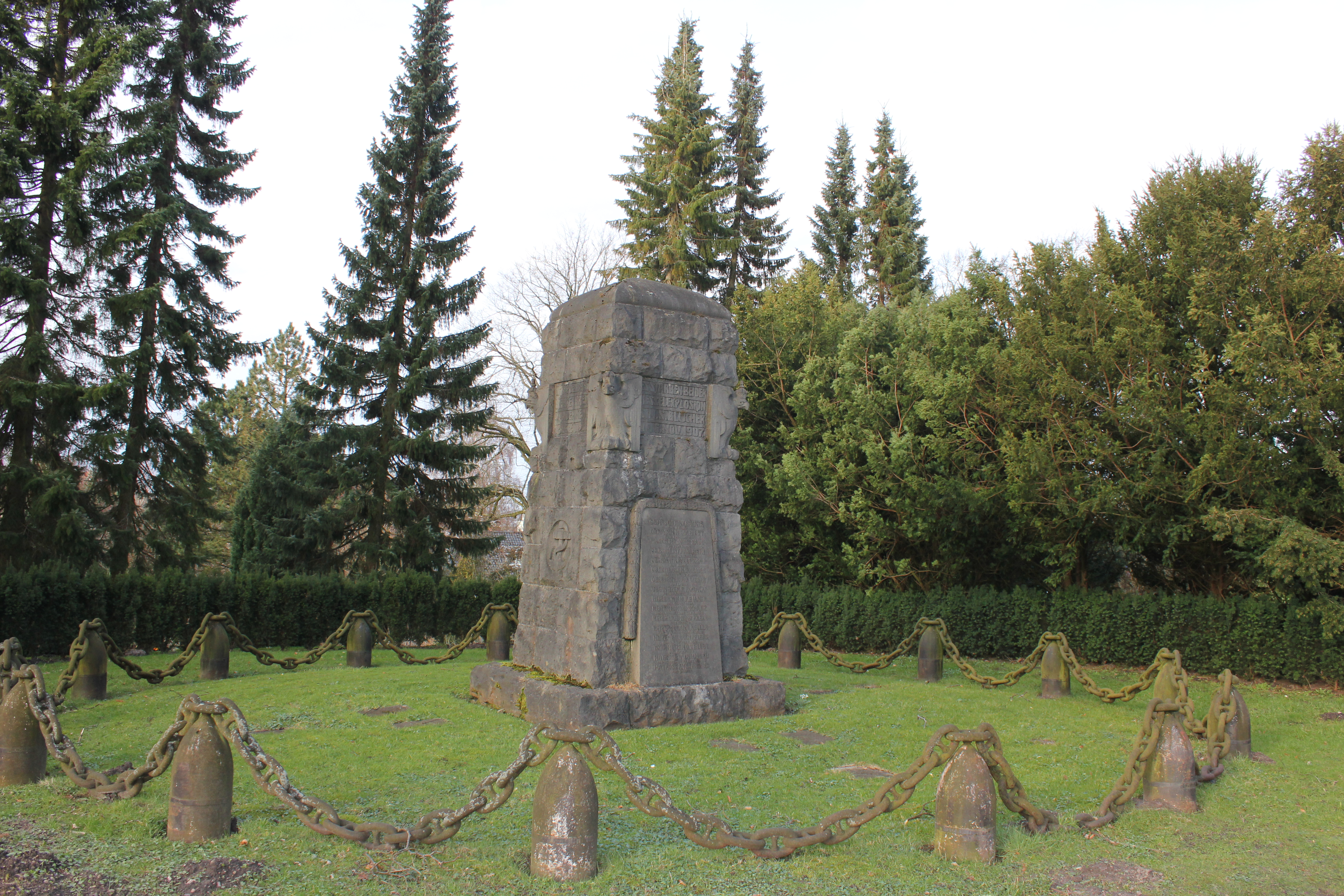 Blücher-Denkmal auf dem Mühlenfriedhof, Flensburg 2014, Bild 03